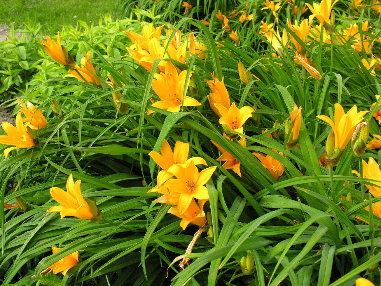 Geltonoji viendienė (Hemerocallis middendorffii) Šeima. Viendieniniai (Hemerocallidaceae) Foto: Algirdas, 2006 m. gegužės 30 d., Lietuva